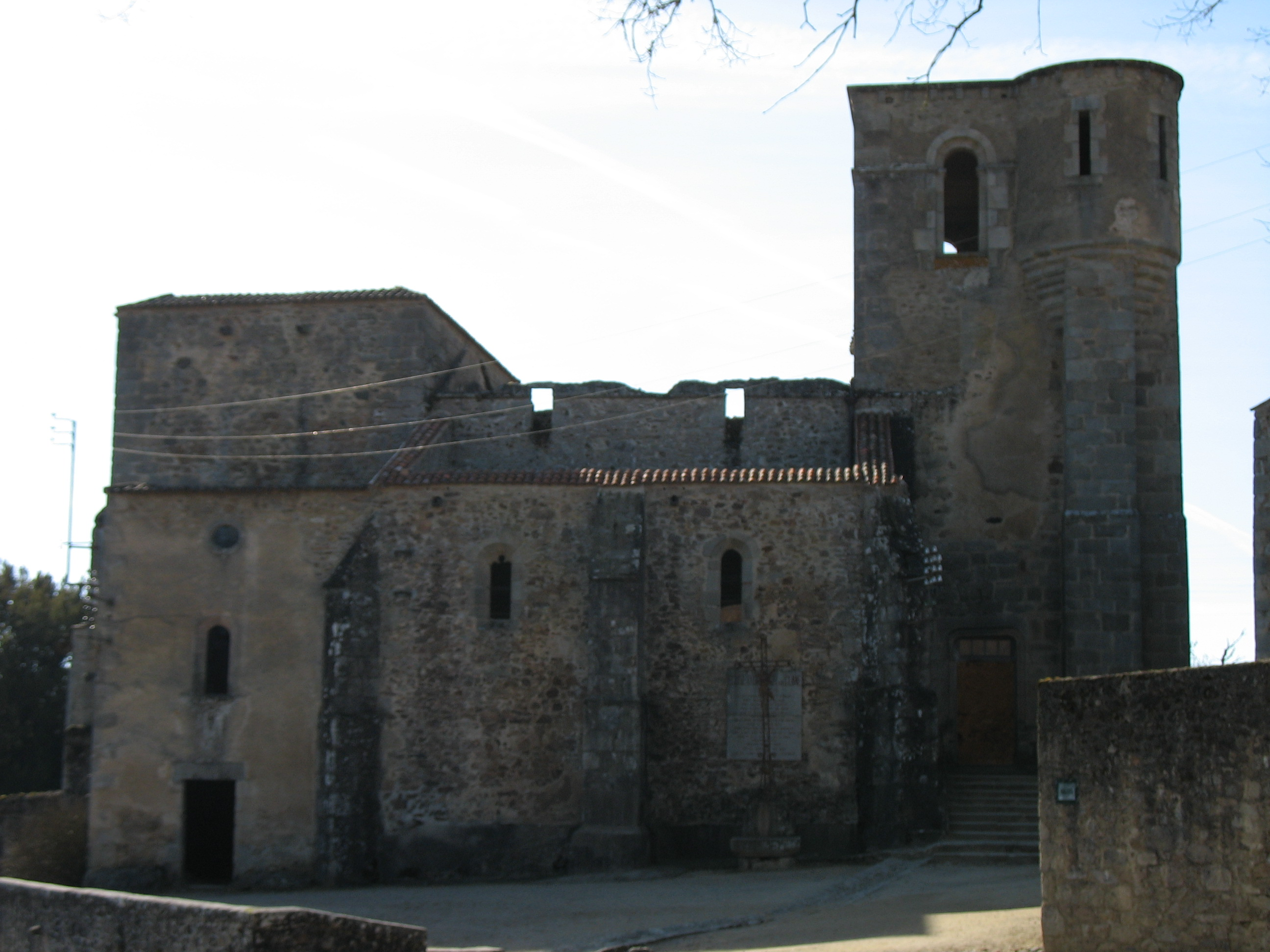 Ce qu'il reste de l'église où furent brulés les femmes et les enfants, lors du massacre.